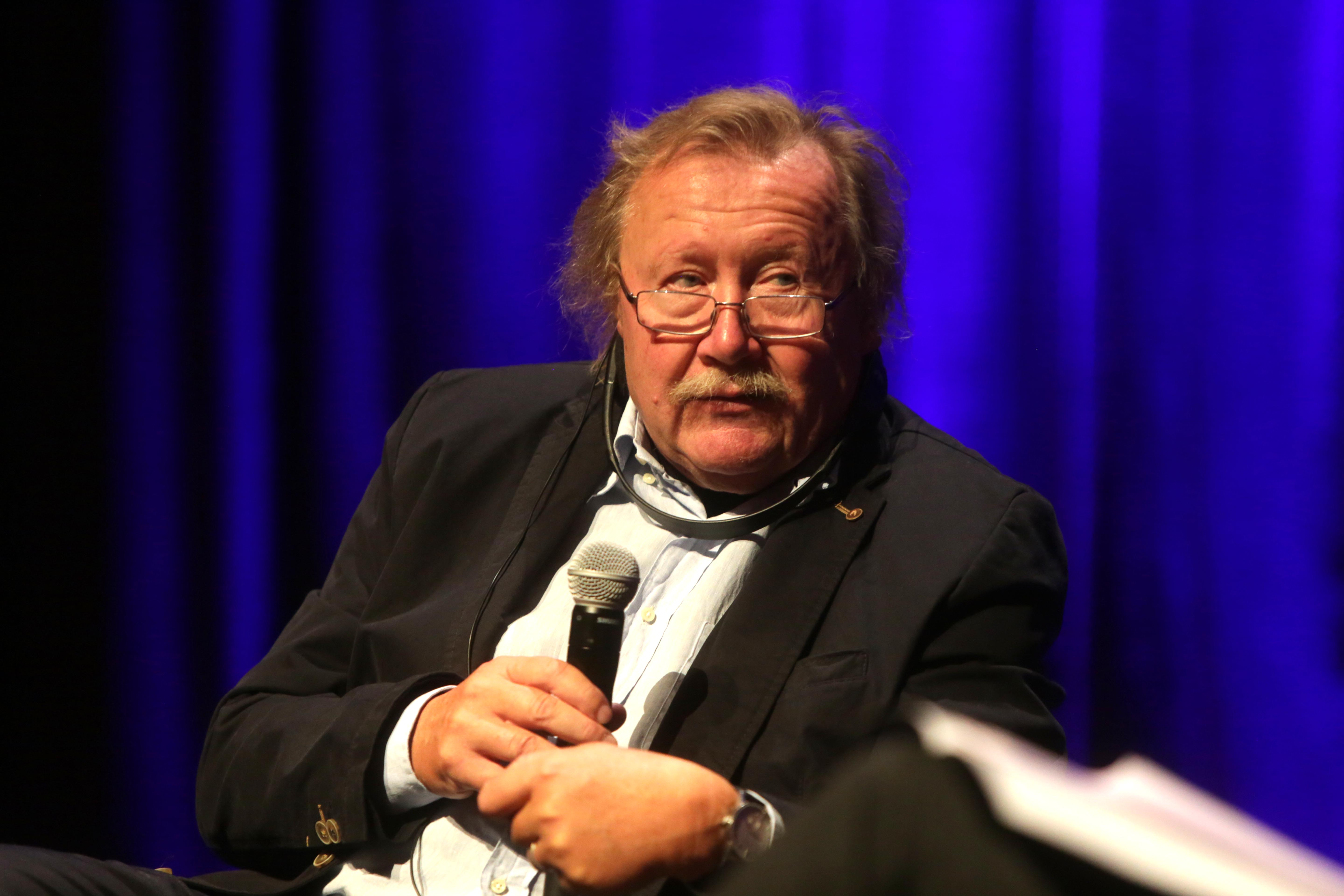 Convidado: Peter Sloterdijk, filósofo alemão Data: 05 de outubro de 2016 Local: Teatro Cetip-Complexo Ohtake Cultural Crédito das imagens: Fronteiras do Pensamento | Greg Salibian